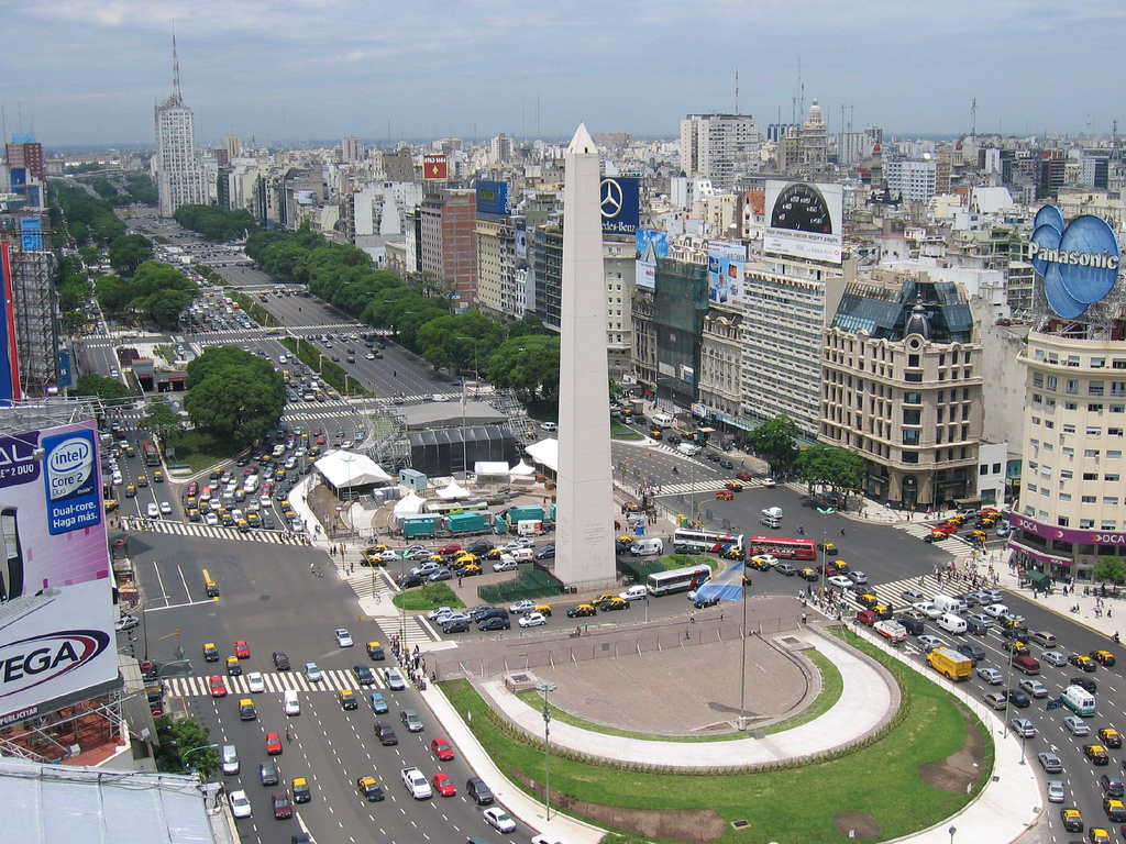 La Avenida más ancha del Mundo